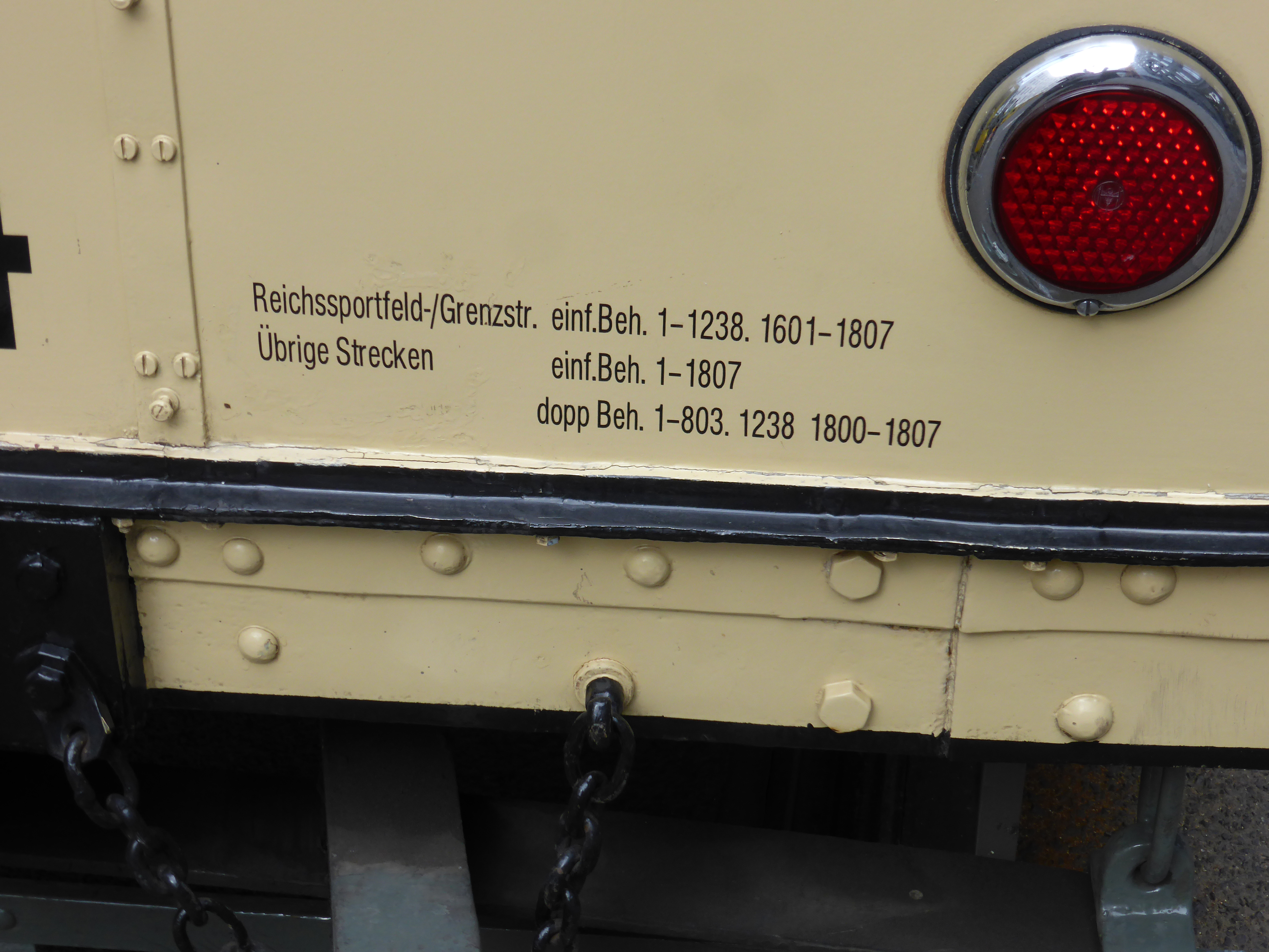 Historische Straßenbahn Berlin.